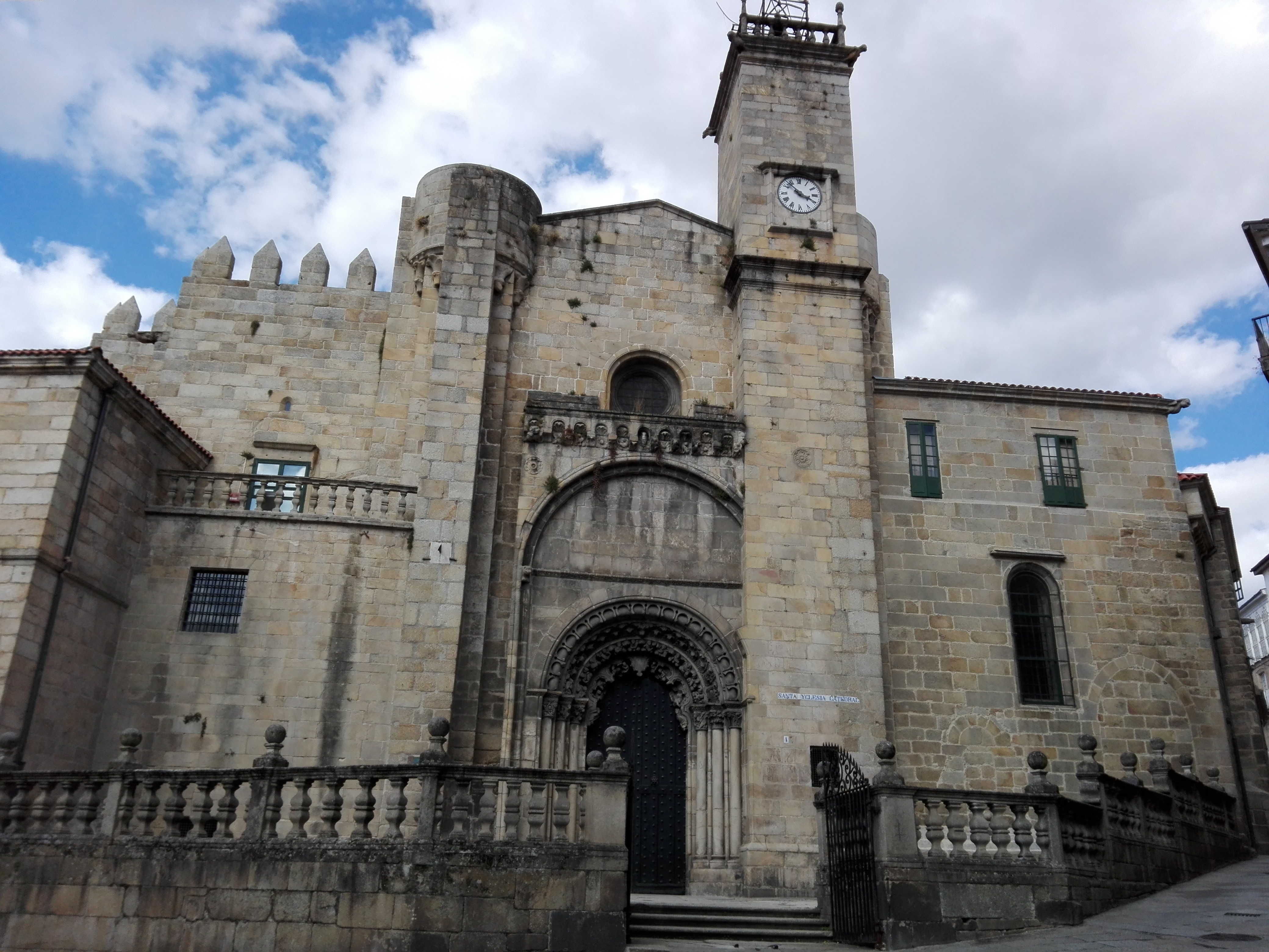 Vista de la fachada sur de la Catedral de Ourense, plaza del Trigo